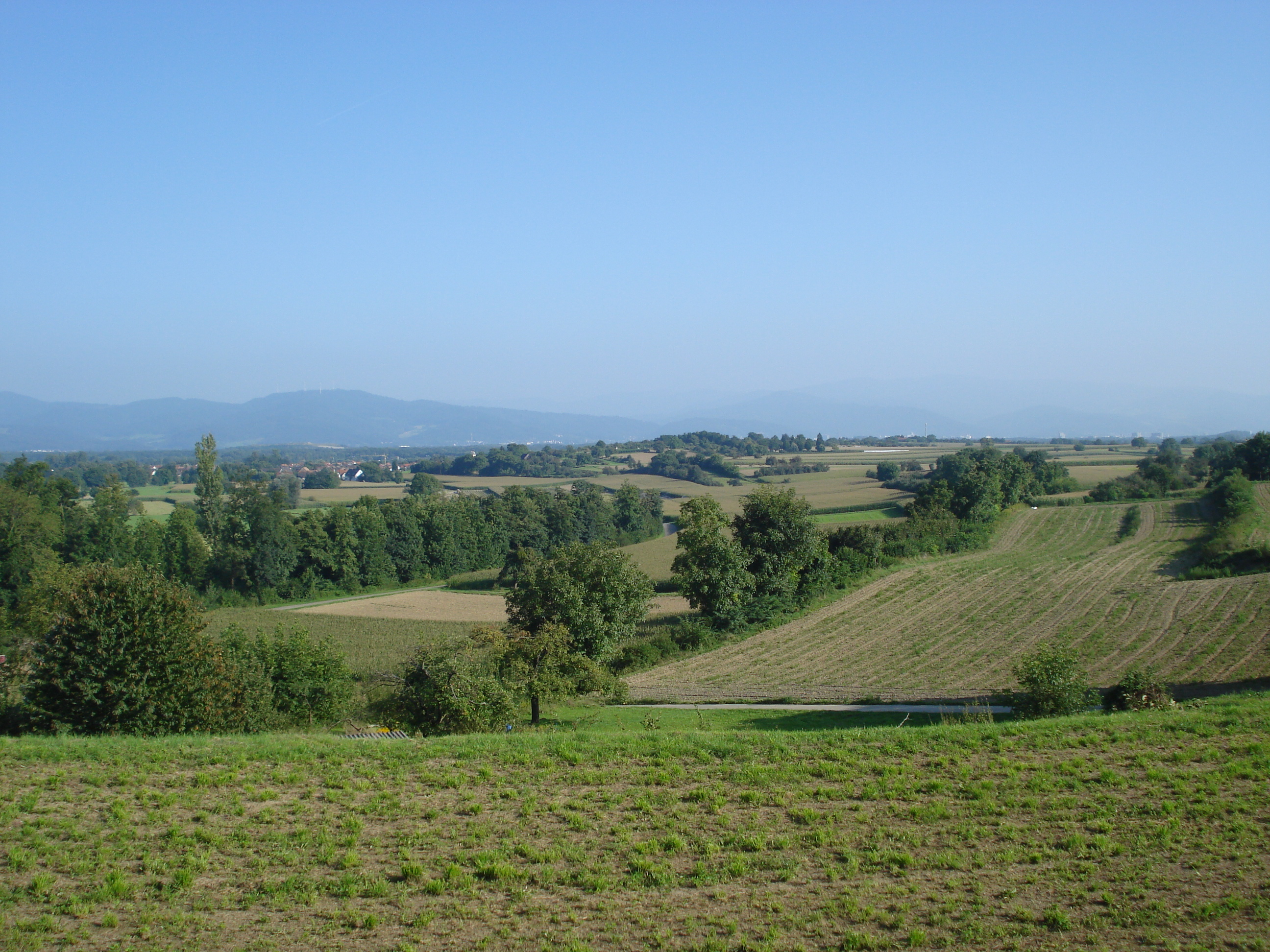 Nimberg bei March-Holzhausen